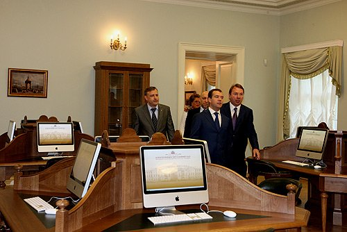 Открытие Президентской библиотеки имени Бориса Ельцина 27 мая 2009 года.